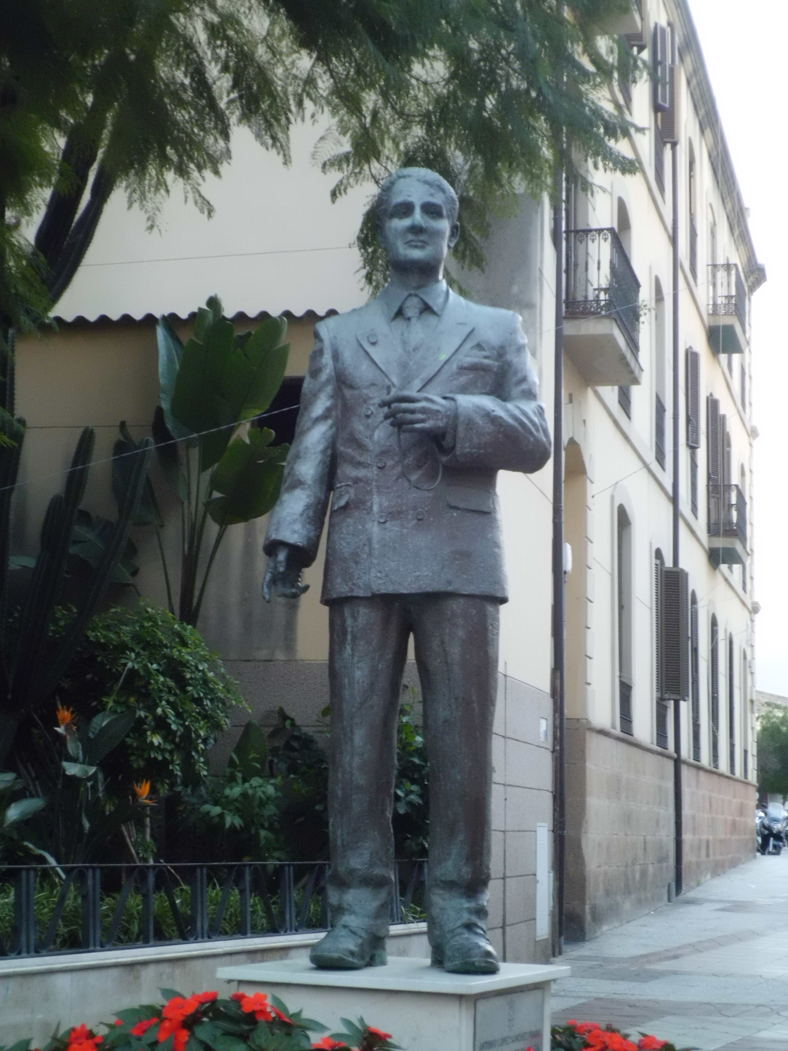 Estatuta de unos de los alcades de Ceuta durante la segunda república.